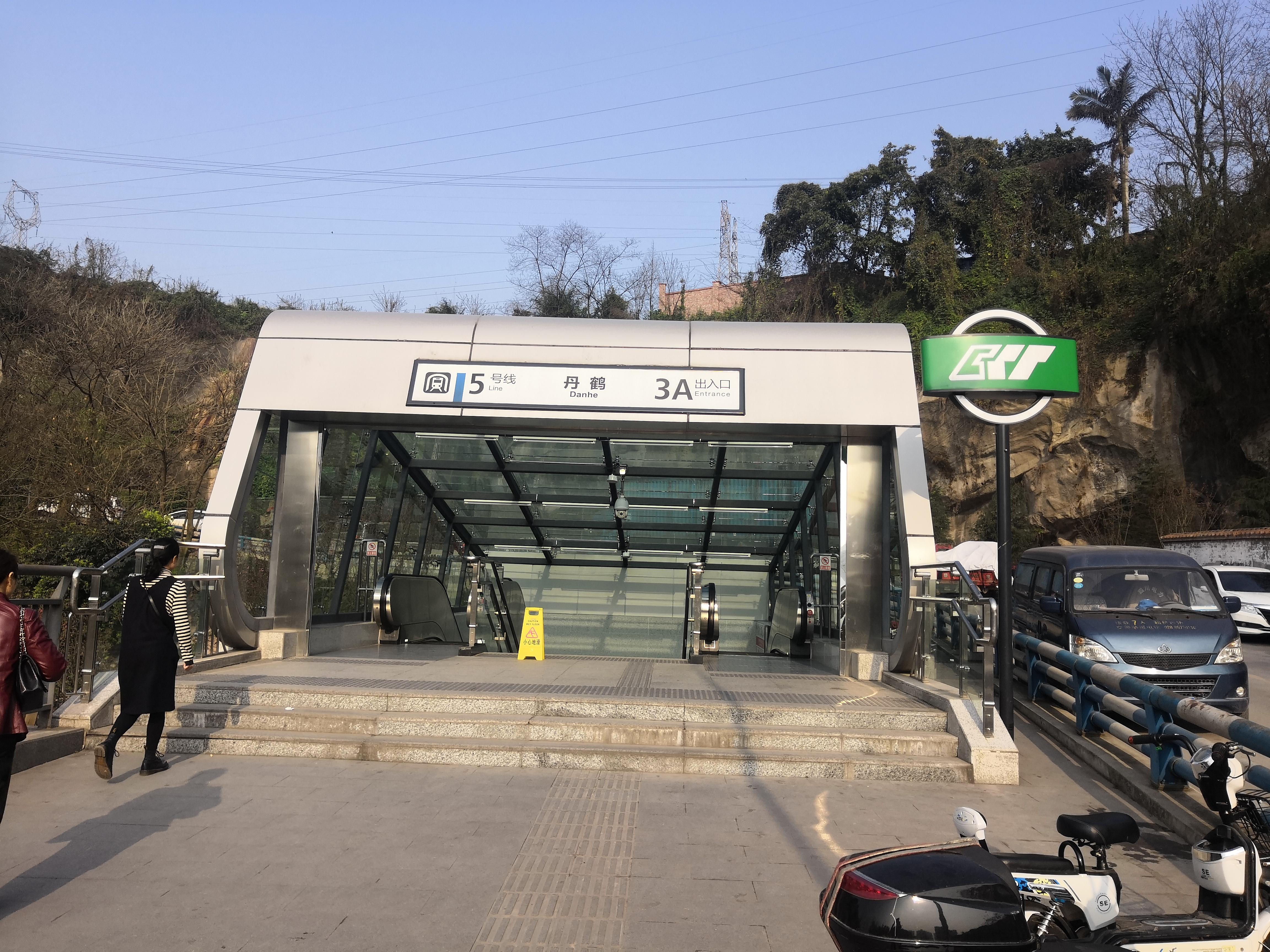 crt line 5